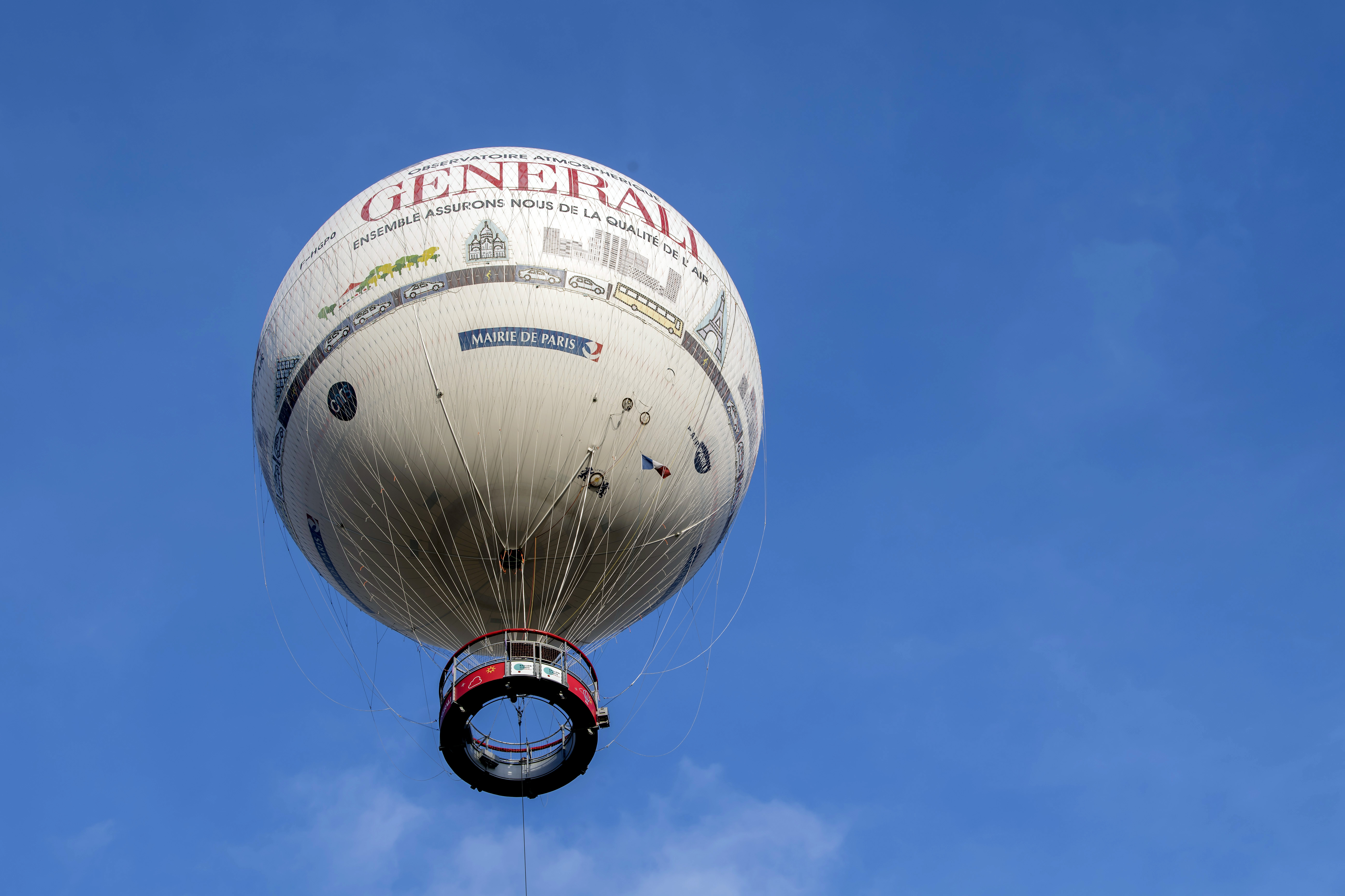 Le Ballon de Paris dans les airs.